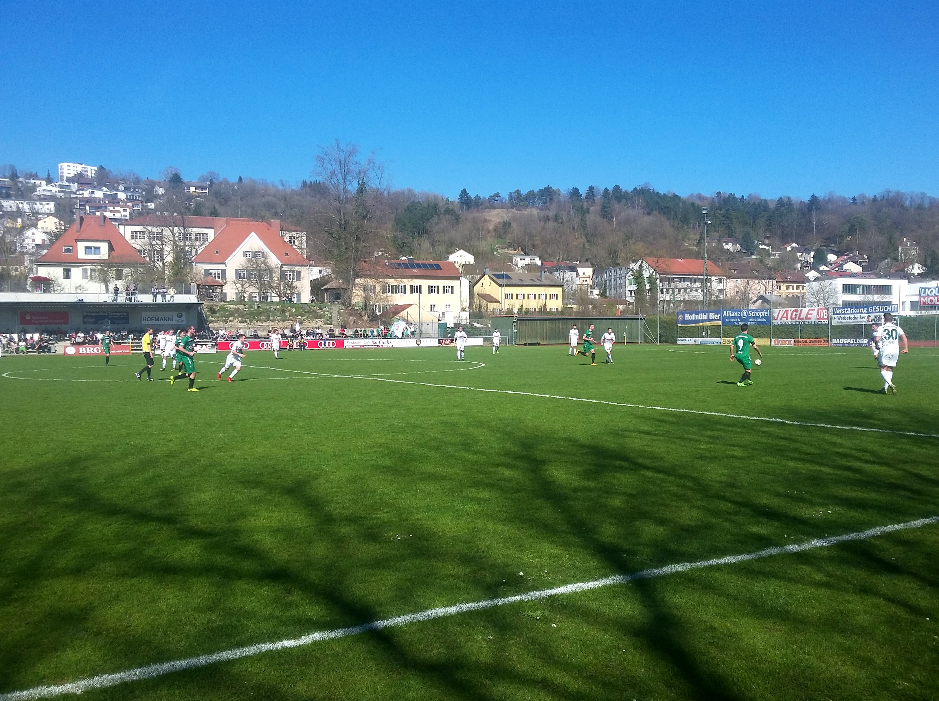 Spiel der Regionalliga Bayern zwischen dem VfB Eichstätt und dem SV Schalding-Heining (4:0) am 7. April 2018